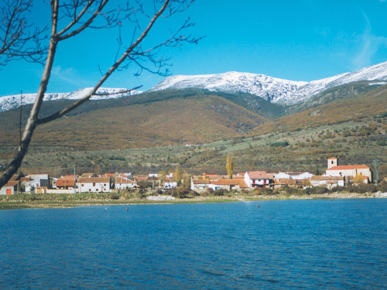 Vista panorámica del embalse con Pinilla del Valle al fondo.